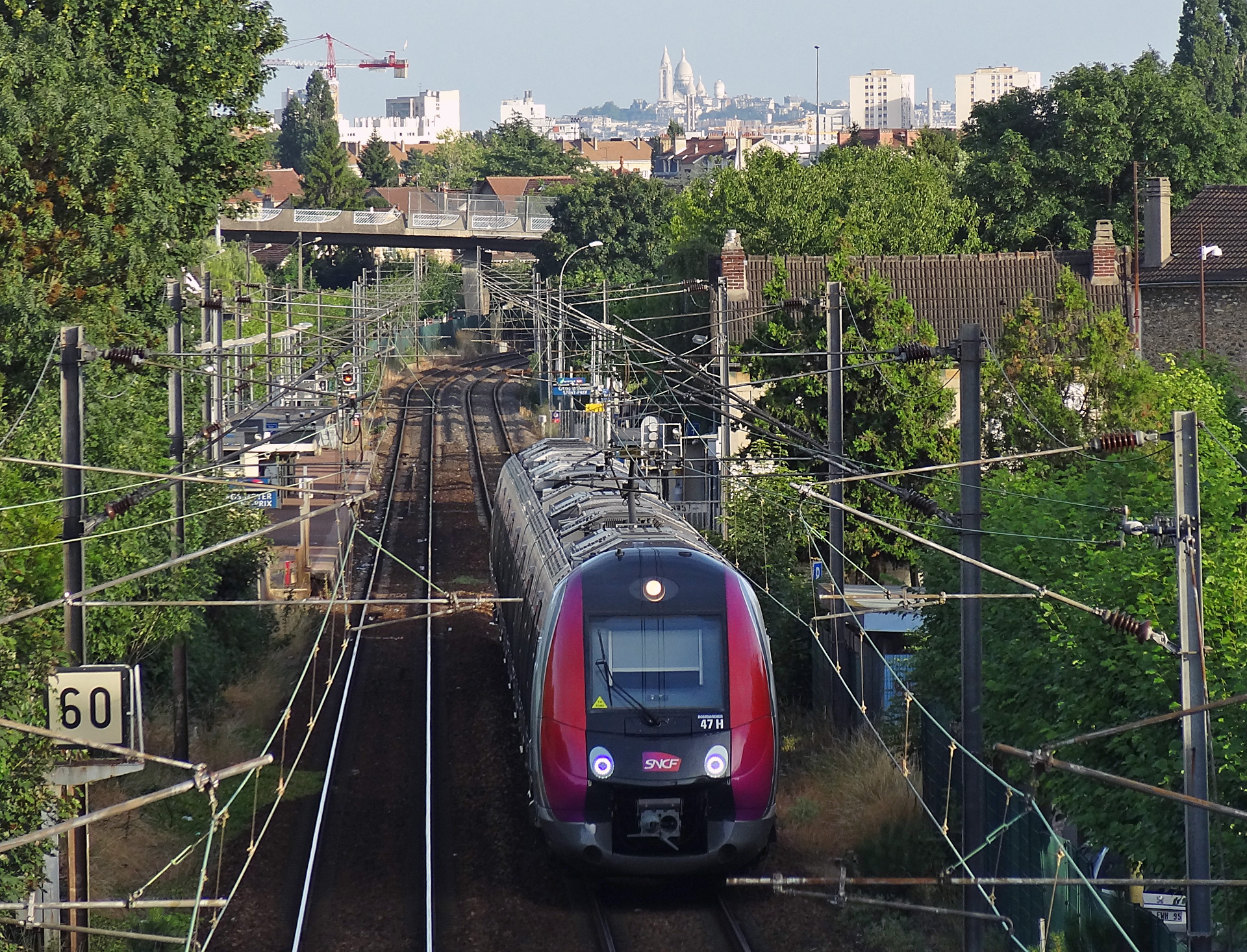 Une rame Z 50000 quitte la gare du Gros Noyer - Saint-Prix à Ermont (Val-d'Oise), France.